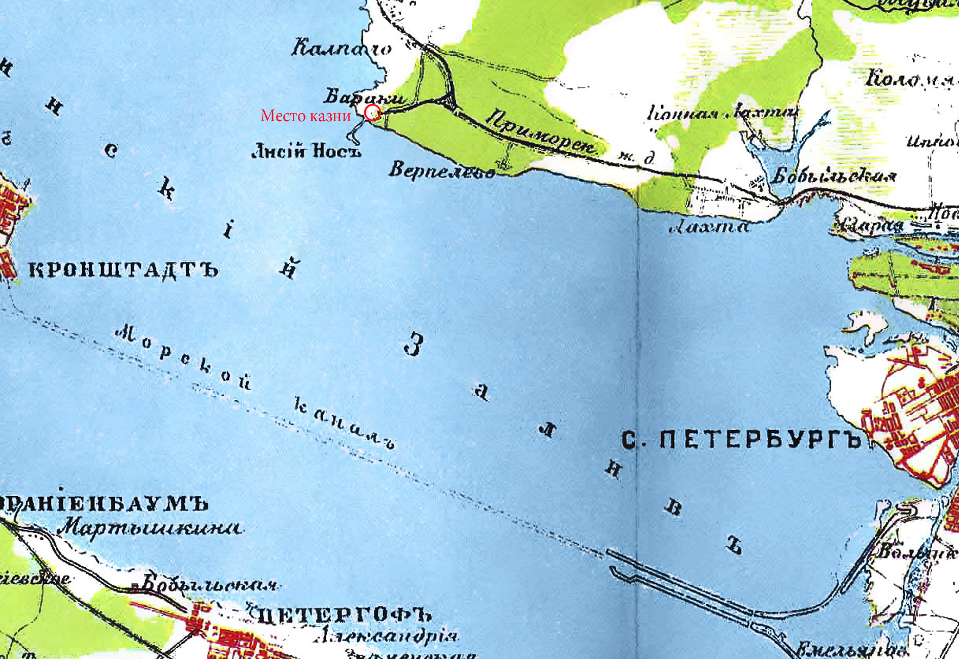 Окрестности Санкт-Петербурга. Брокгауз и Ефрон.